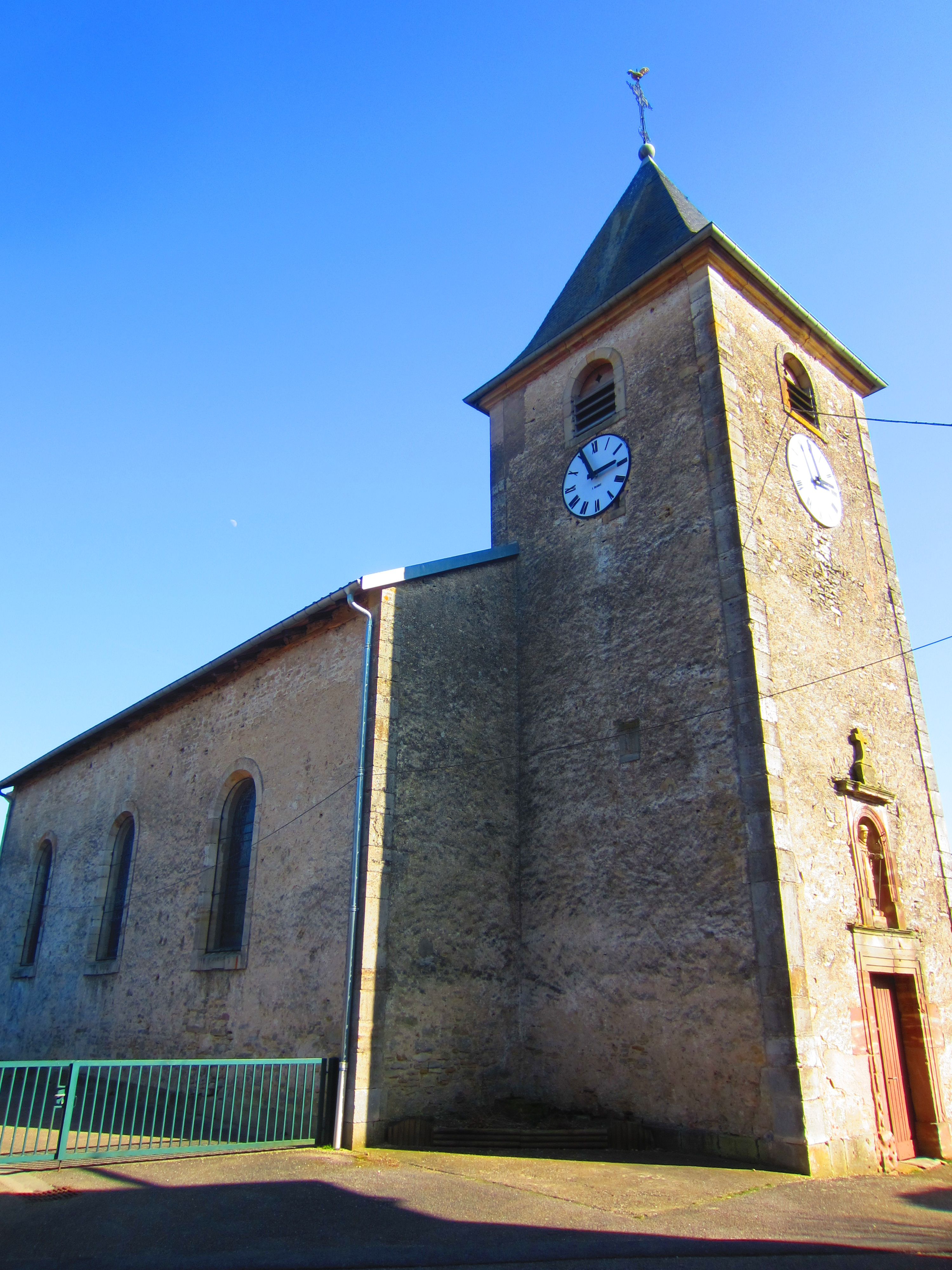 Vallois eglise